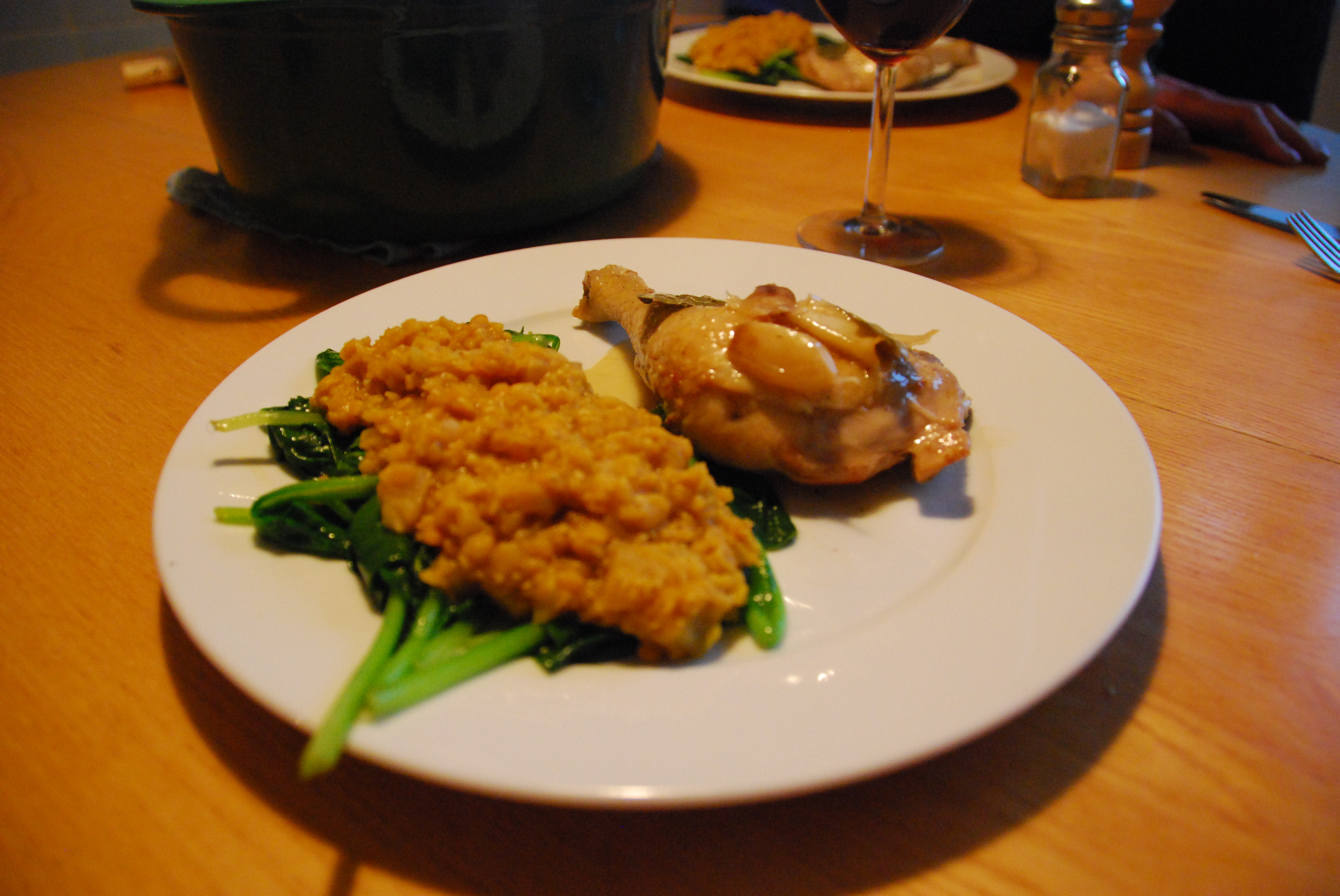 (23 april 2008)